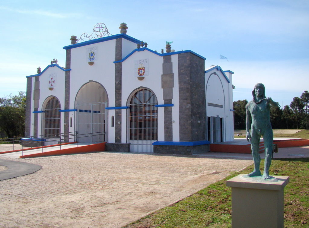 Centro Cultural Vilinha, em Curitiba (capital do estado do Paraná, Sul do Brasil), localizado às margens do Rio Atuba (no Bairro Alto) dentro do Parque Histórico de Curitiba/Parque Histórico da Vilinha.